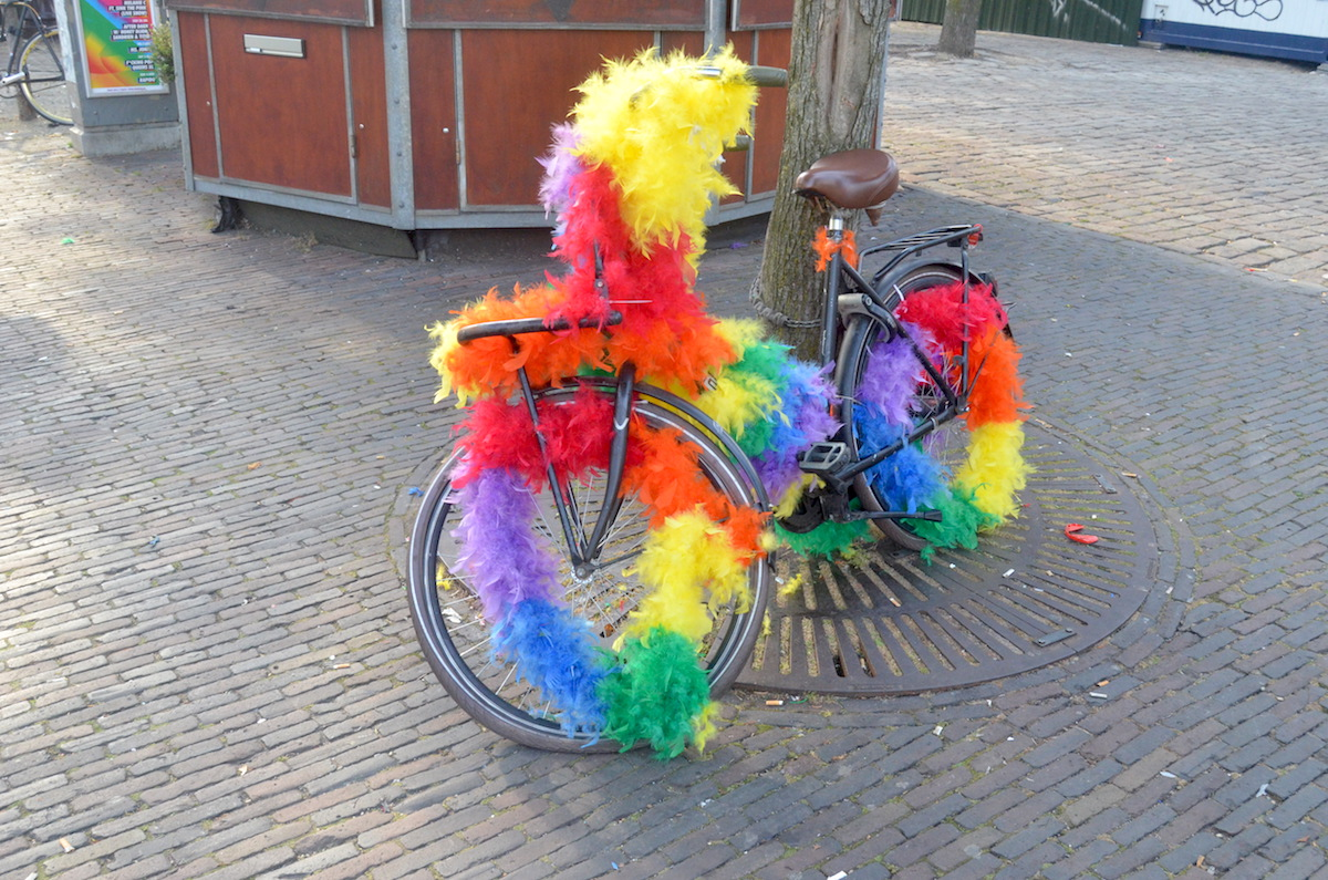 Regenboogfiets op de Westermarkt (Amsterdam), nabij het Homomonument. Foto: Erik Swierstra.